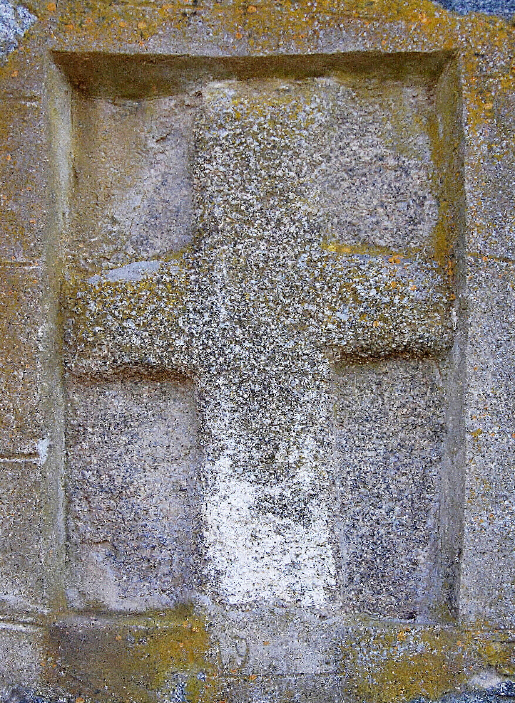 Smírčí kámen (Naloučany), zasazen v tarasní zdi u čp. 1, Naloučany